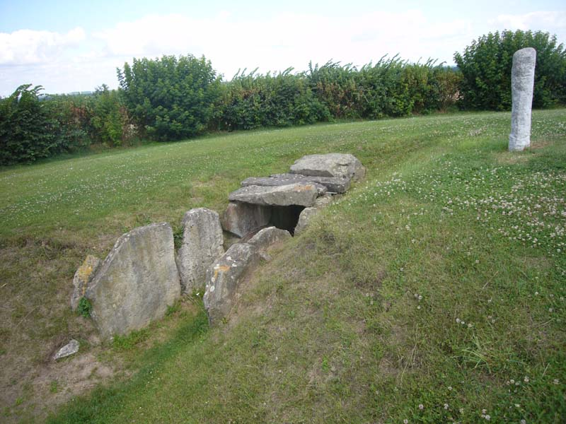 Großsteingrab - Eichstädter Warte